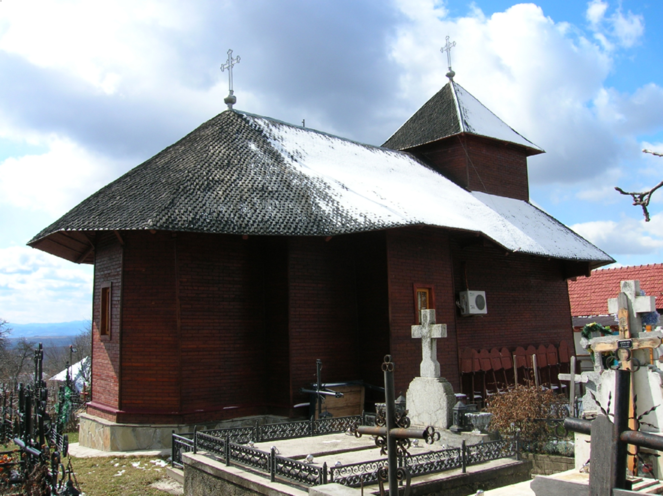 Sapatele bisericii